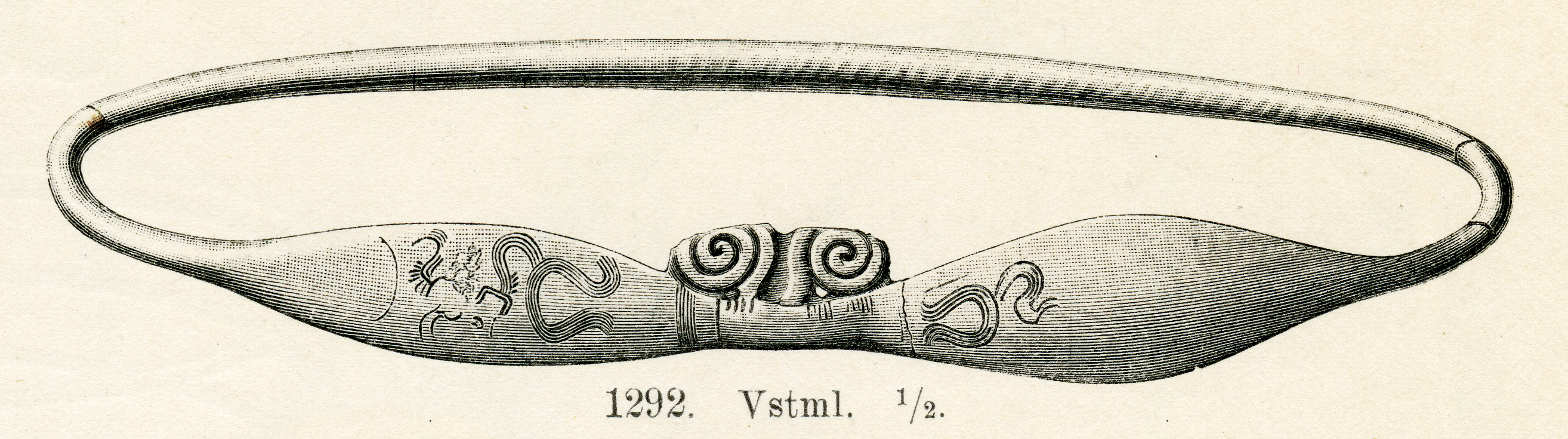 Bronshalsring från Frösåker, Kärrbo socken, Siende härad, Västerås kommun, Västmanlands län, Västmanland, Sverige. Träsnitt ur Minnen från vår forntid: I Stenåldern och bronsåldern (1917) av Oscar Montelius, figur 1292. Dateras till bronsålderns period V.